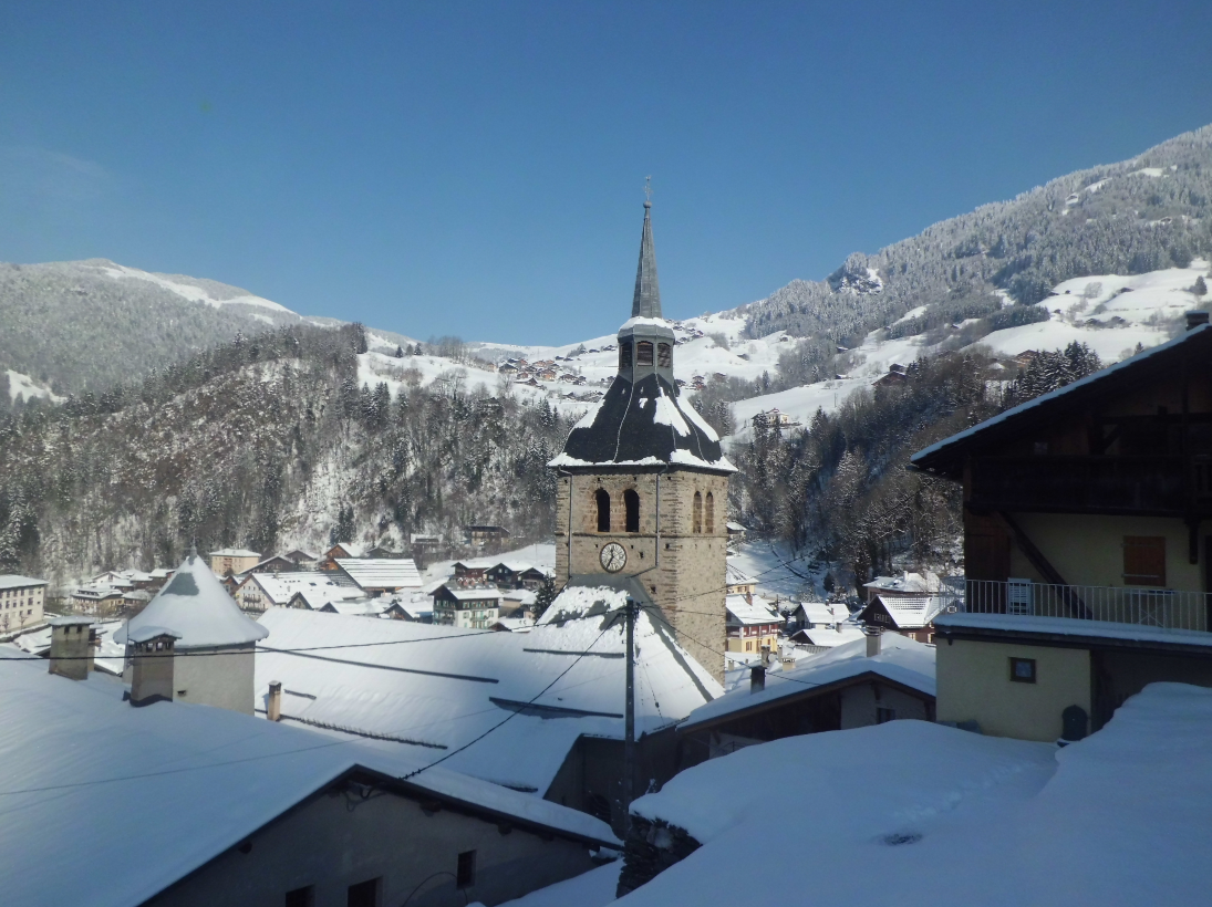 Village de Beaufort depuis la route d'Arêches en hiver